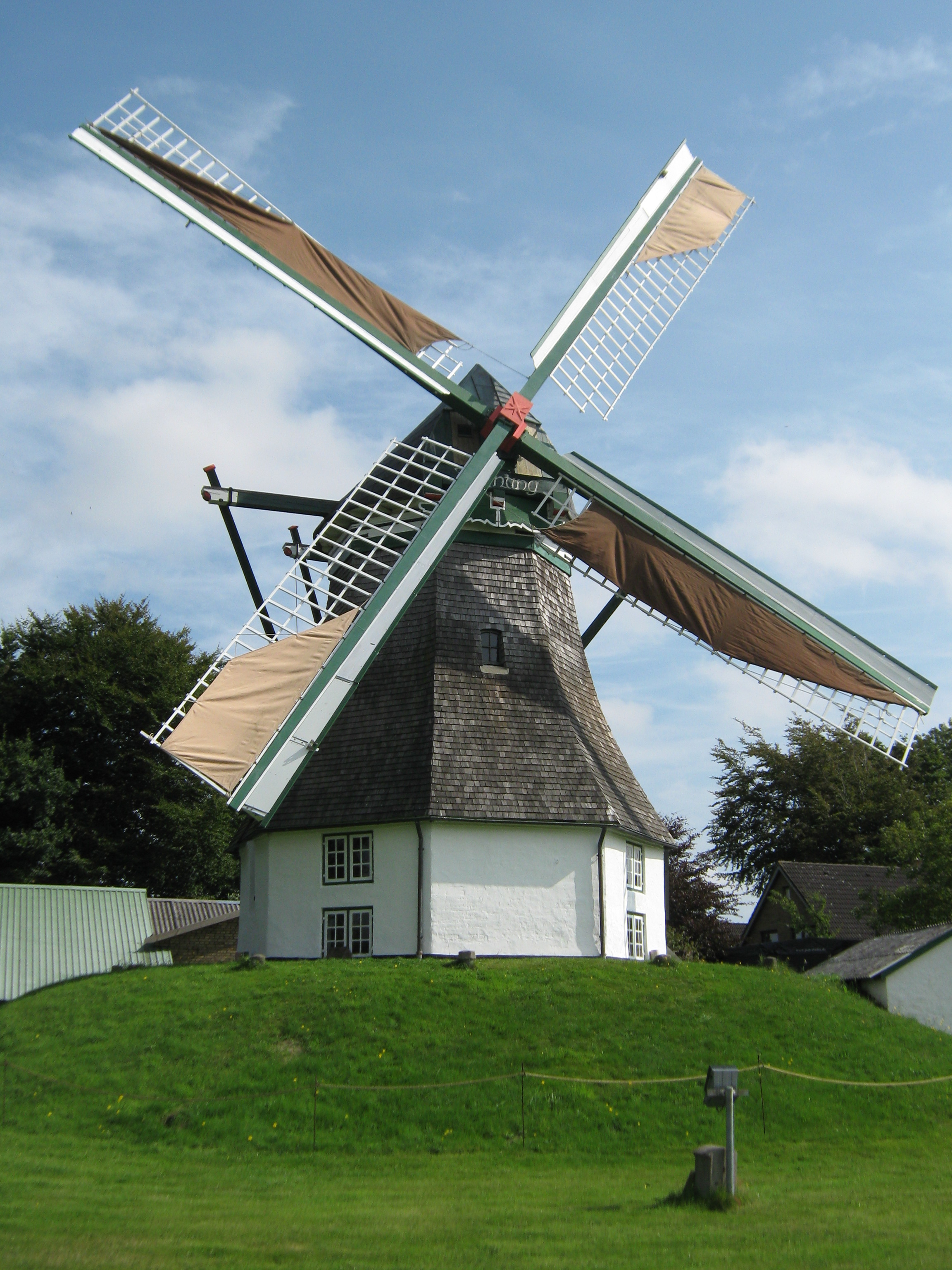 Windmühle Hoffnung in Auberg 4, Munkbrarup (Kreis Schleswig-Flensburg). Der Kellerholländer ist mit Segelfügeln und Steert ausgerüstet und wird seit 2012 wieder zur Herstellung von Graupen verwendet.